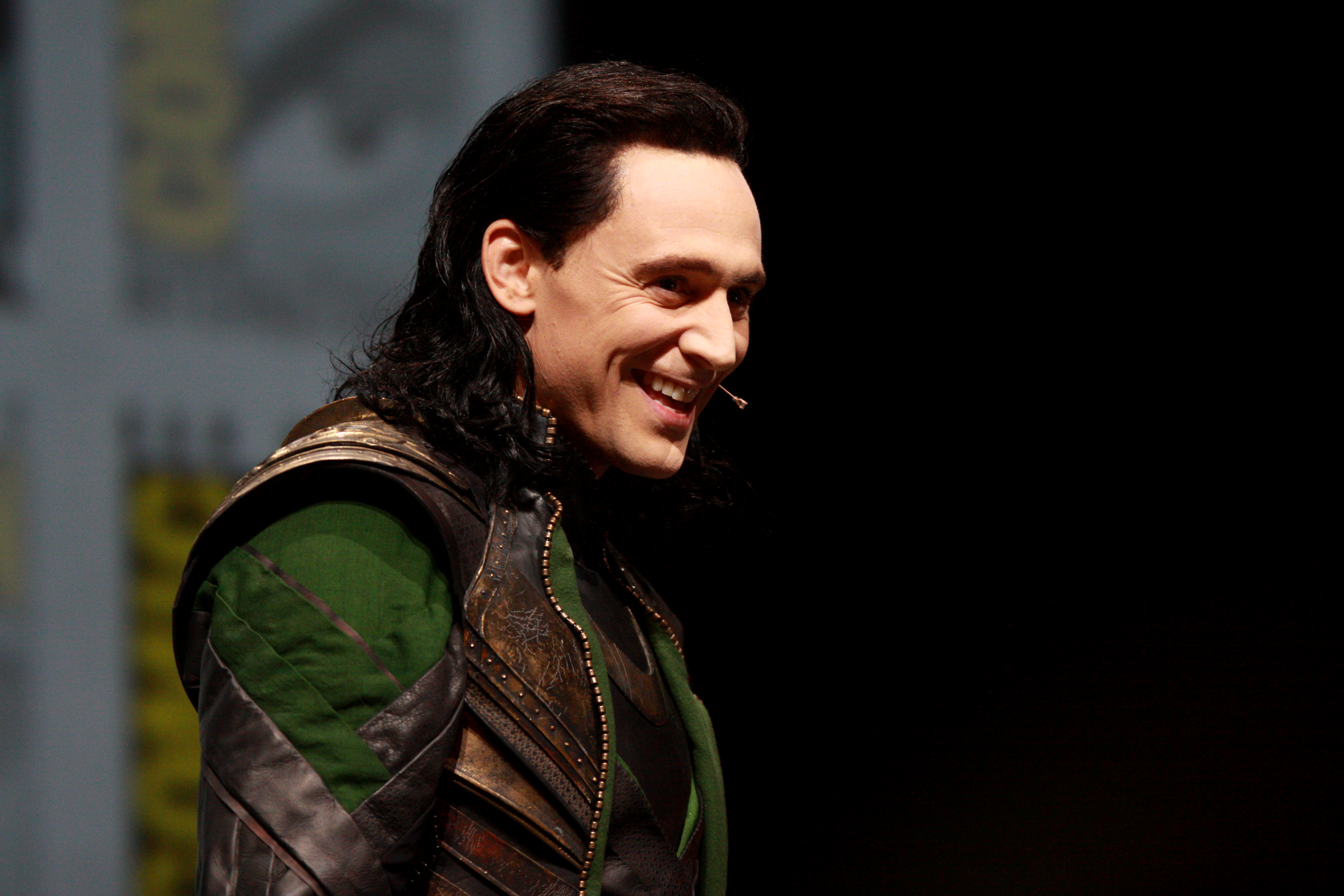 Том Хиддлстон в костюме Локи